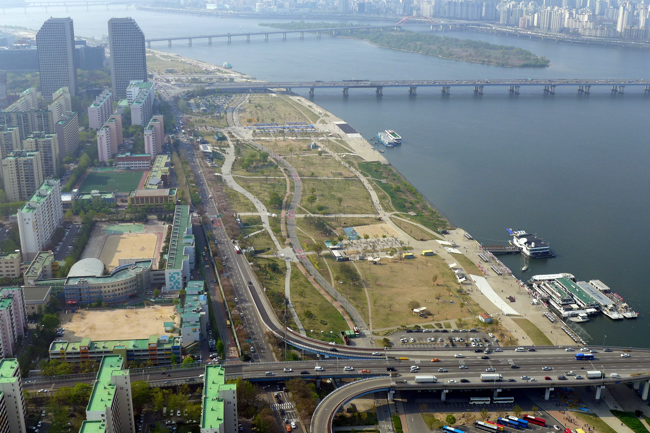 Hangang Park